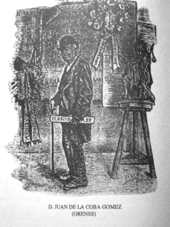 En 1897 Taxes –Xesta– fai un debuxo de Juan de la Coba, para Galicia Moderna –unha das poucas imaxes que deste personaxe se conservan–, no que coloca de fondo un par de pancartas nas que figuran os títulos das obras escritas por este e ao lado delas esboza un exemplar de El Gracioso